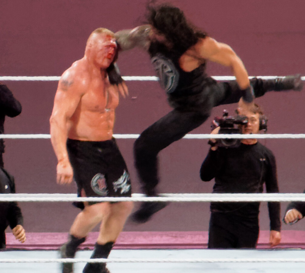 2015-03-29_19-53-39_ILCE-6000_9998_DxO